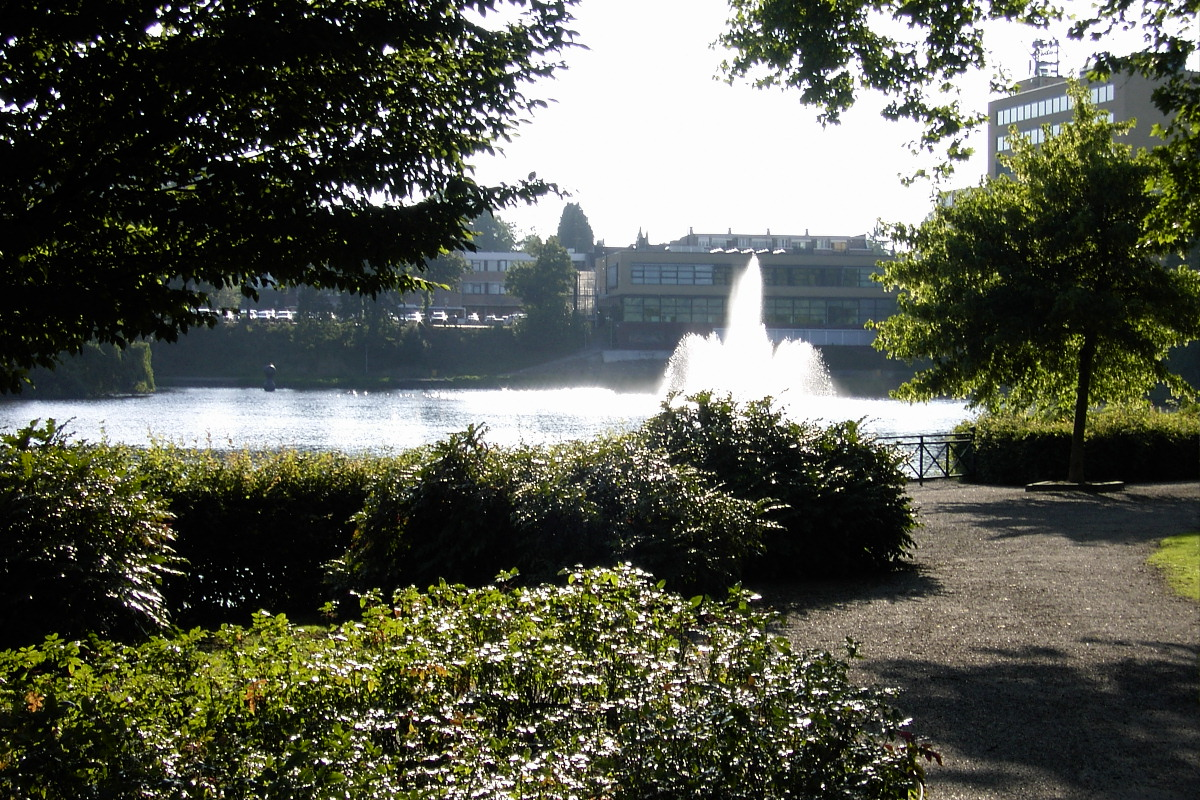 Innenstadt von Brunssum, Park, Vijverpark